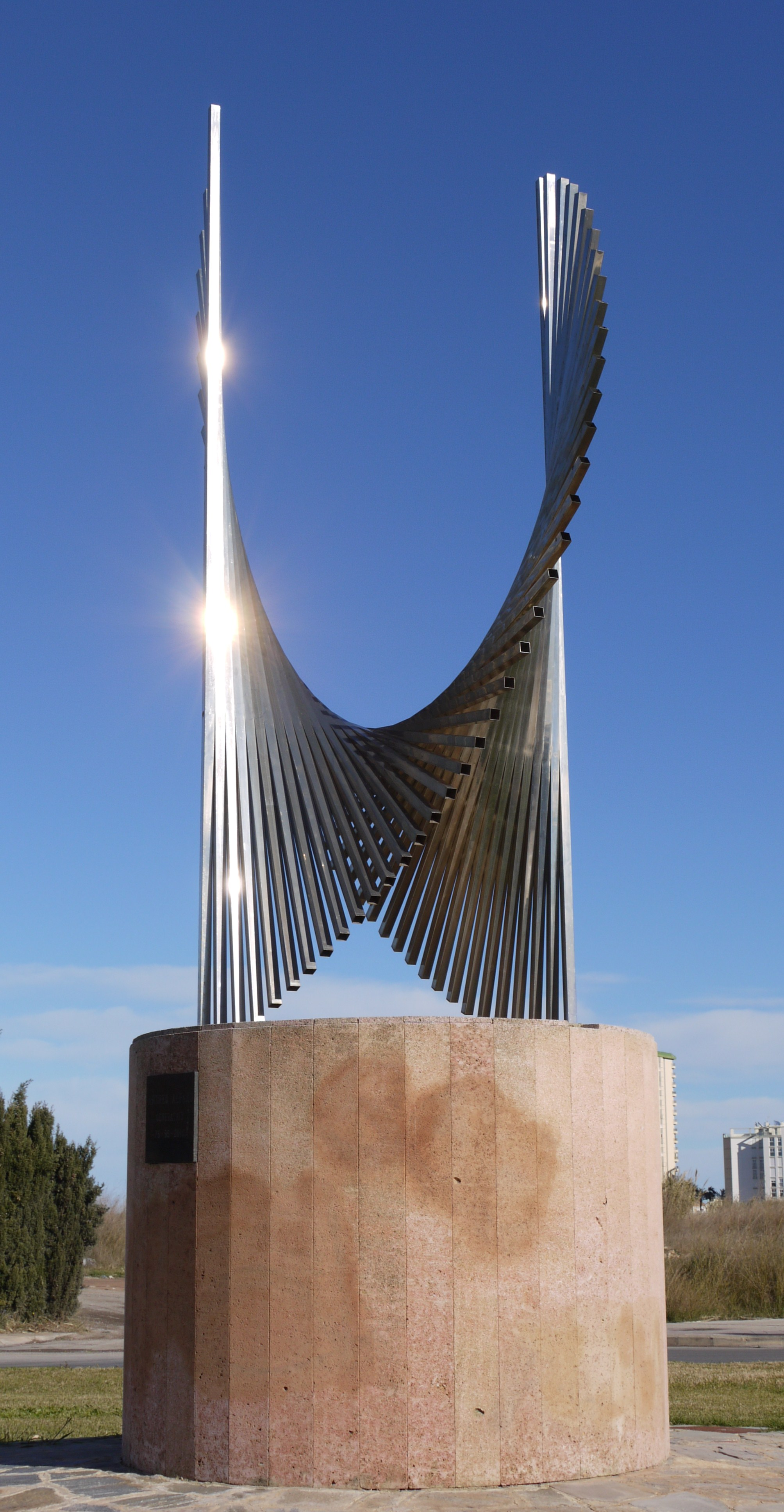 Un nou día, escultura de Andreu Alfaro. 1974. Donación de Ricardo J. Vicent a El Puig de Santamaría (Valencia-España).